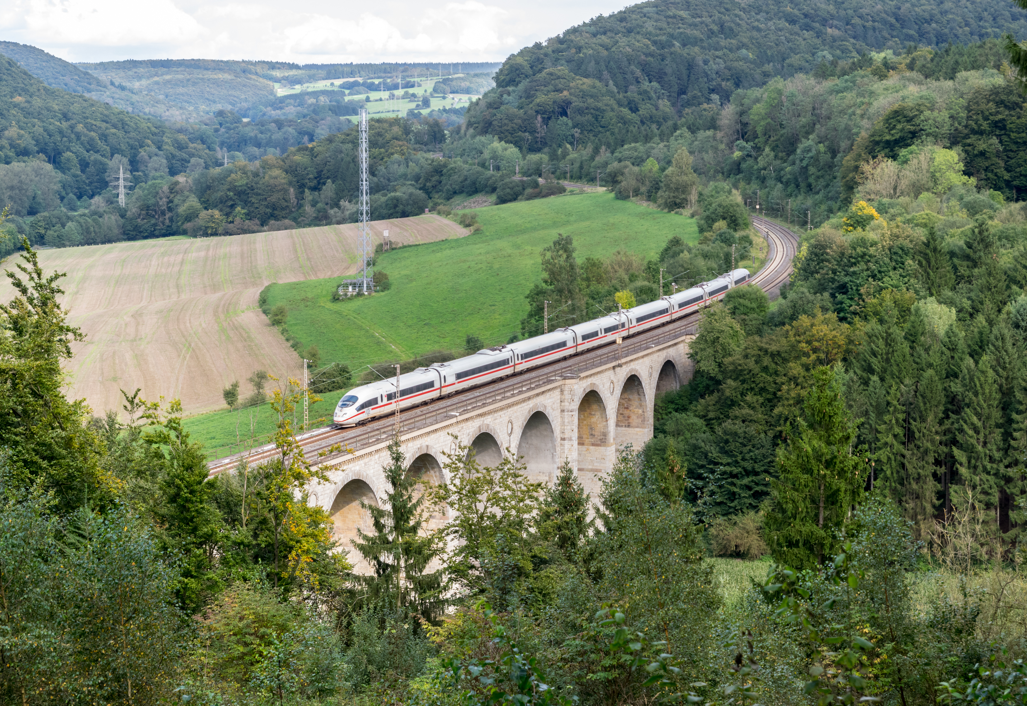 ICE auf dem Kleinen Viadukt, Paderborn-Neuenbeken